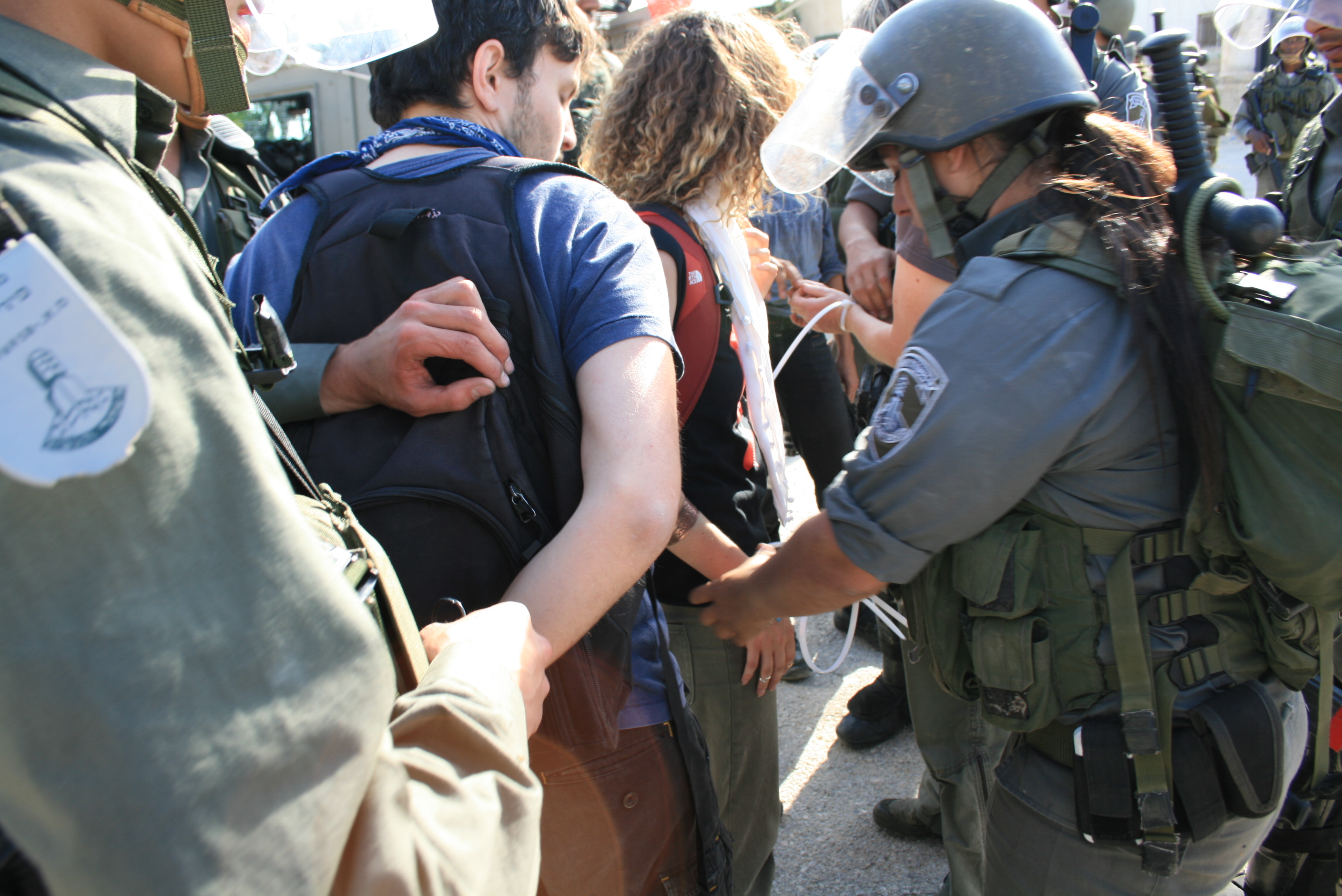 מעצר מפגין בנבי סאלח, מאי 2011